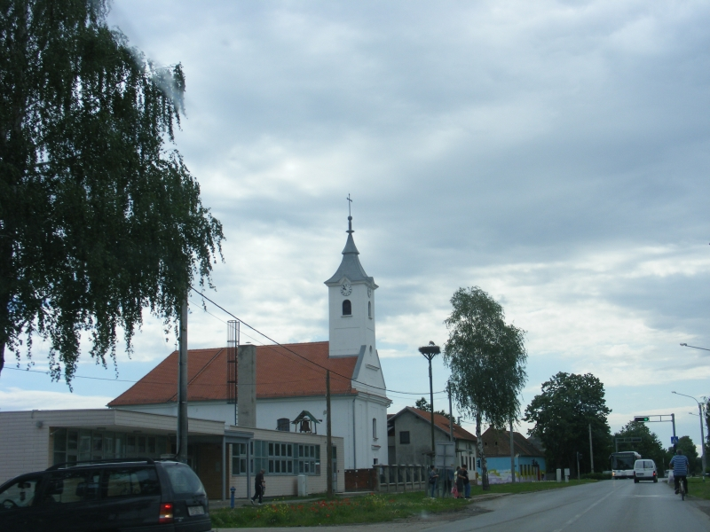 Crkva u Sarvašu